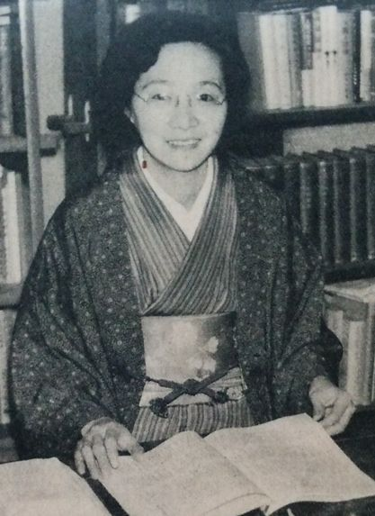 中田正子